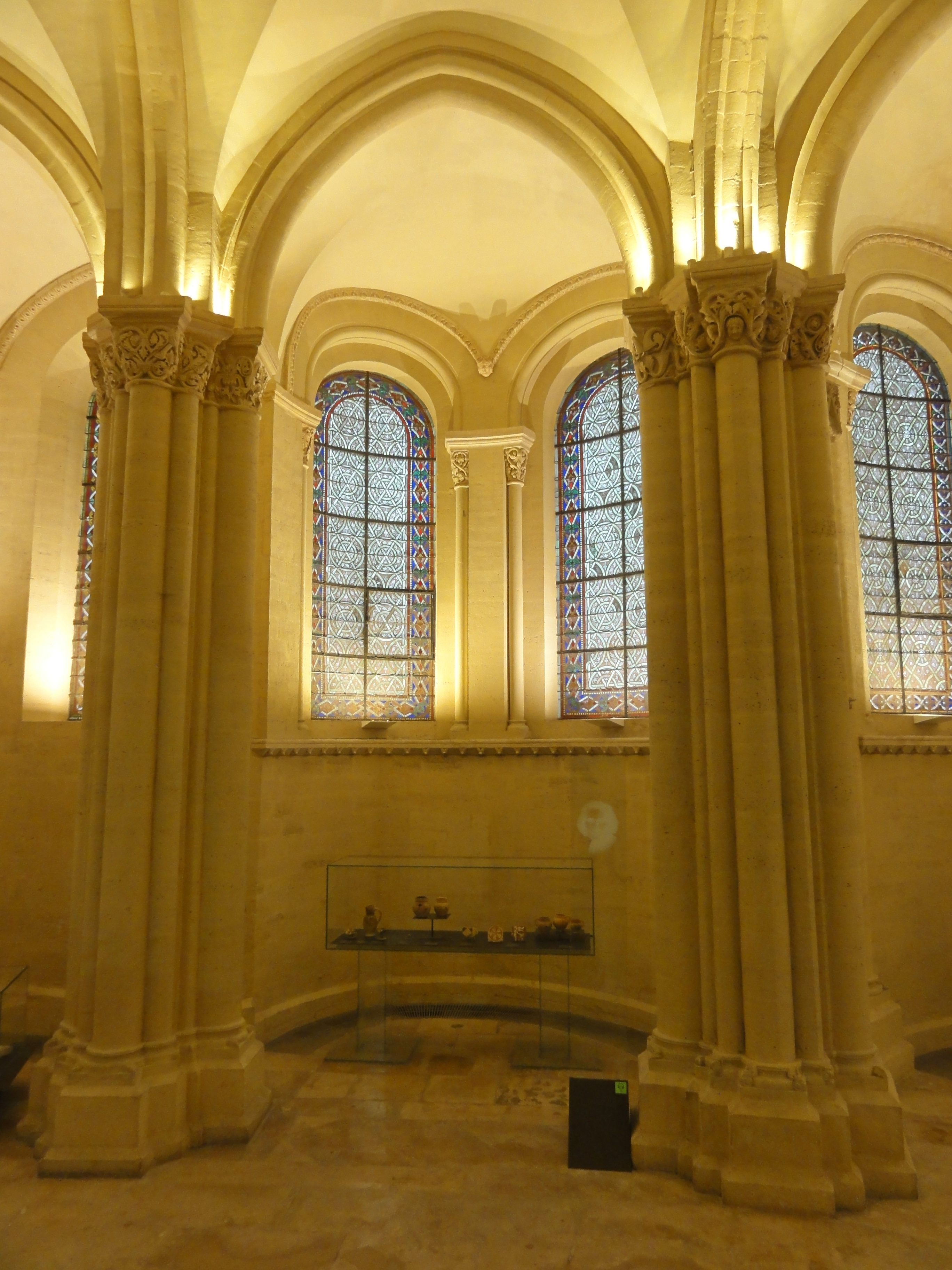 Déambulatoire nord, 3e chapelle.